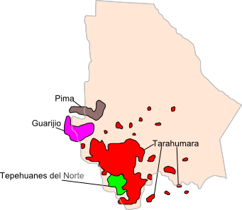 Mapa de Distribución de Grupos etnicos en Chihuahua 2005